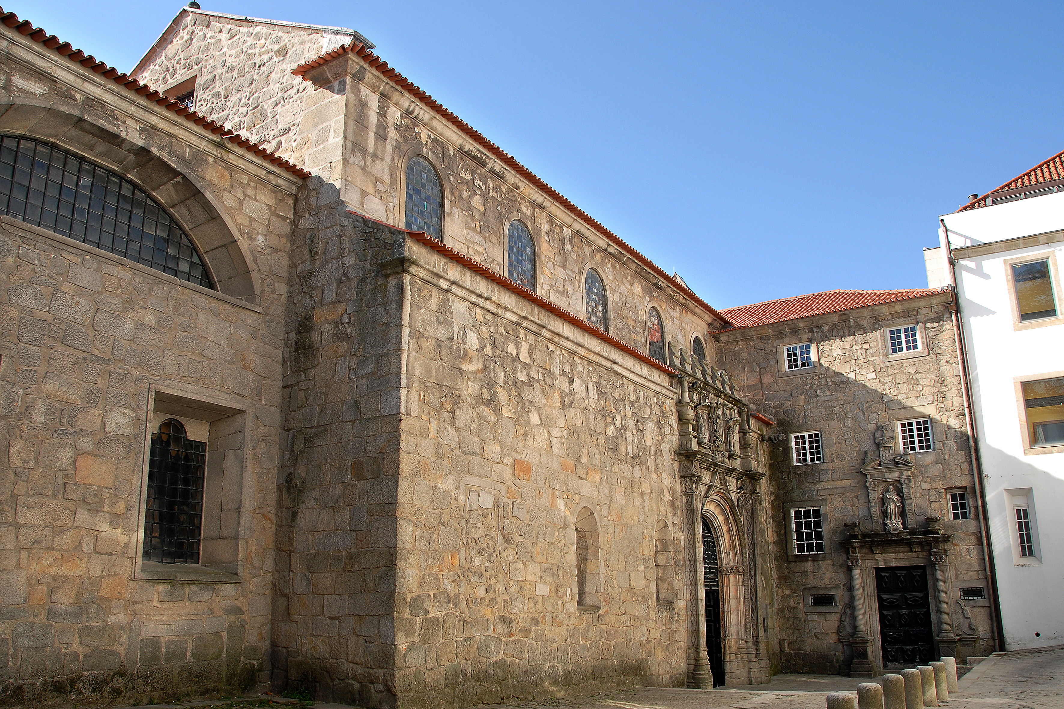 Igreja de Santa Clara This file was uploaded for Wiki Loves Monuments in Portugal with the unique identifier 70198.